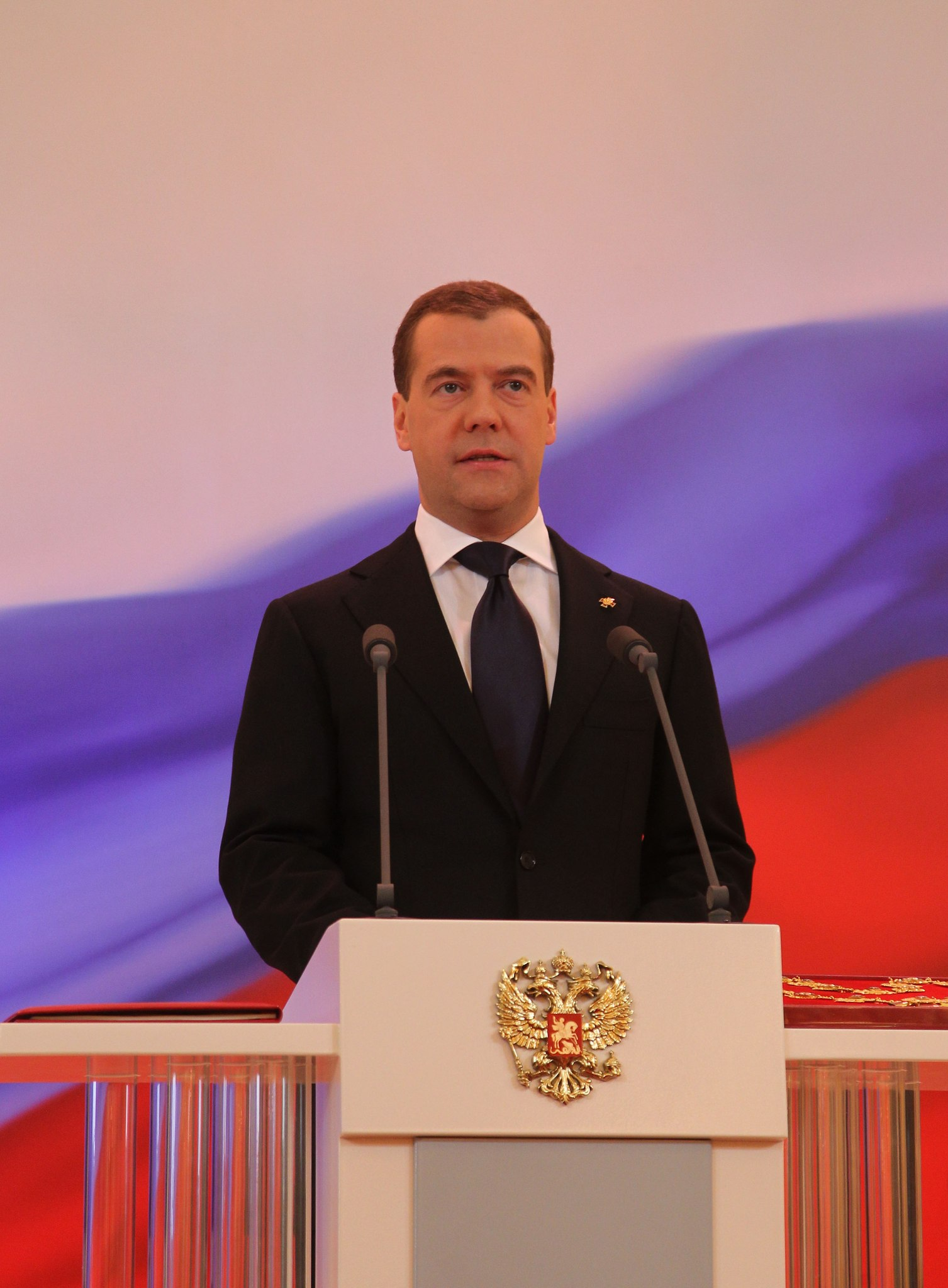 Dmitry Medvédev en la inauguración de Vladímir Putin como presidente de Rusia.